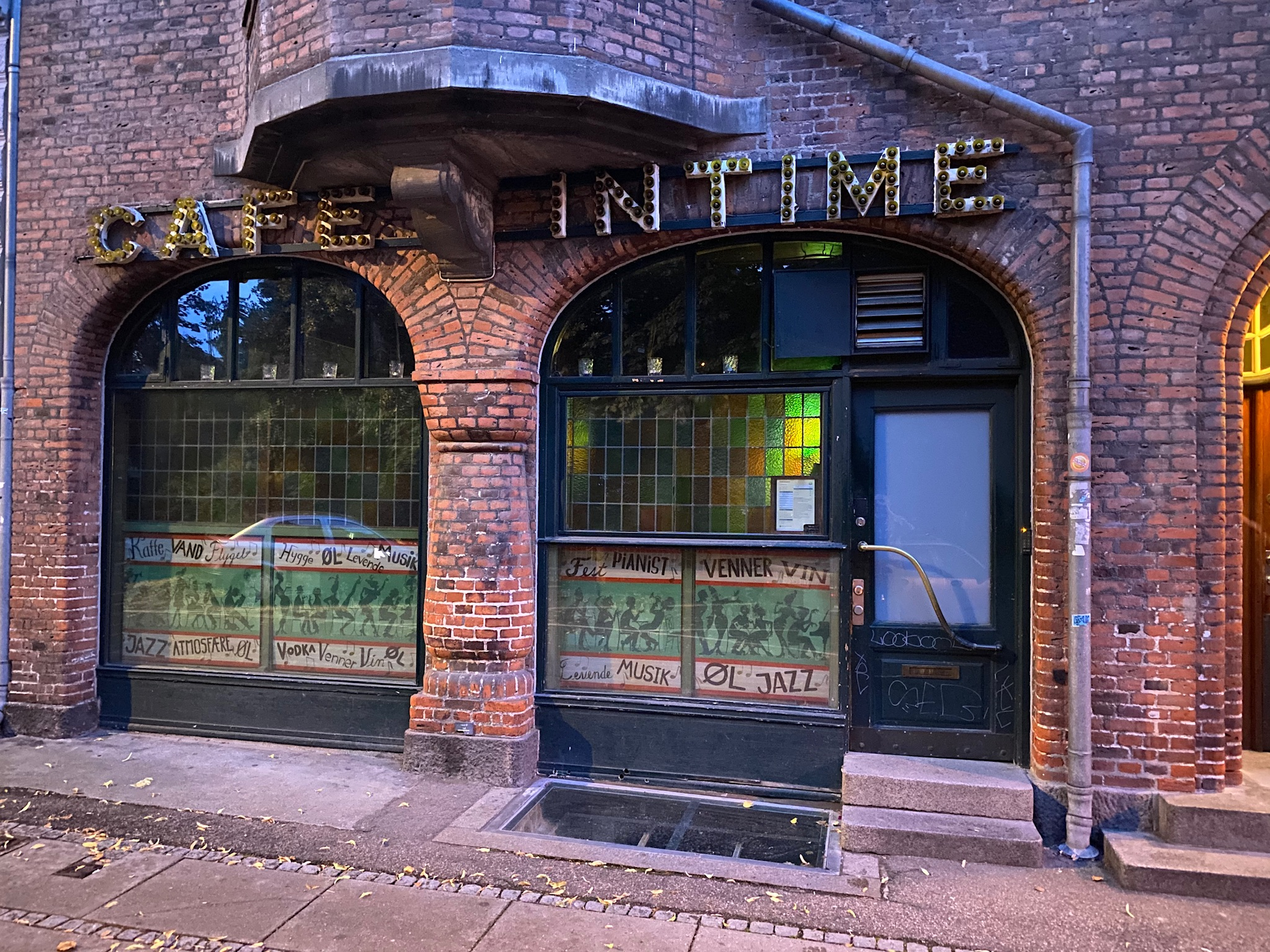 Cafe Intime at Frederiksberg